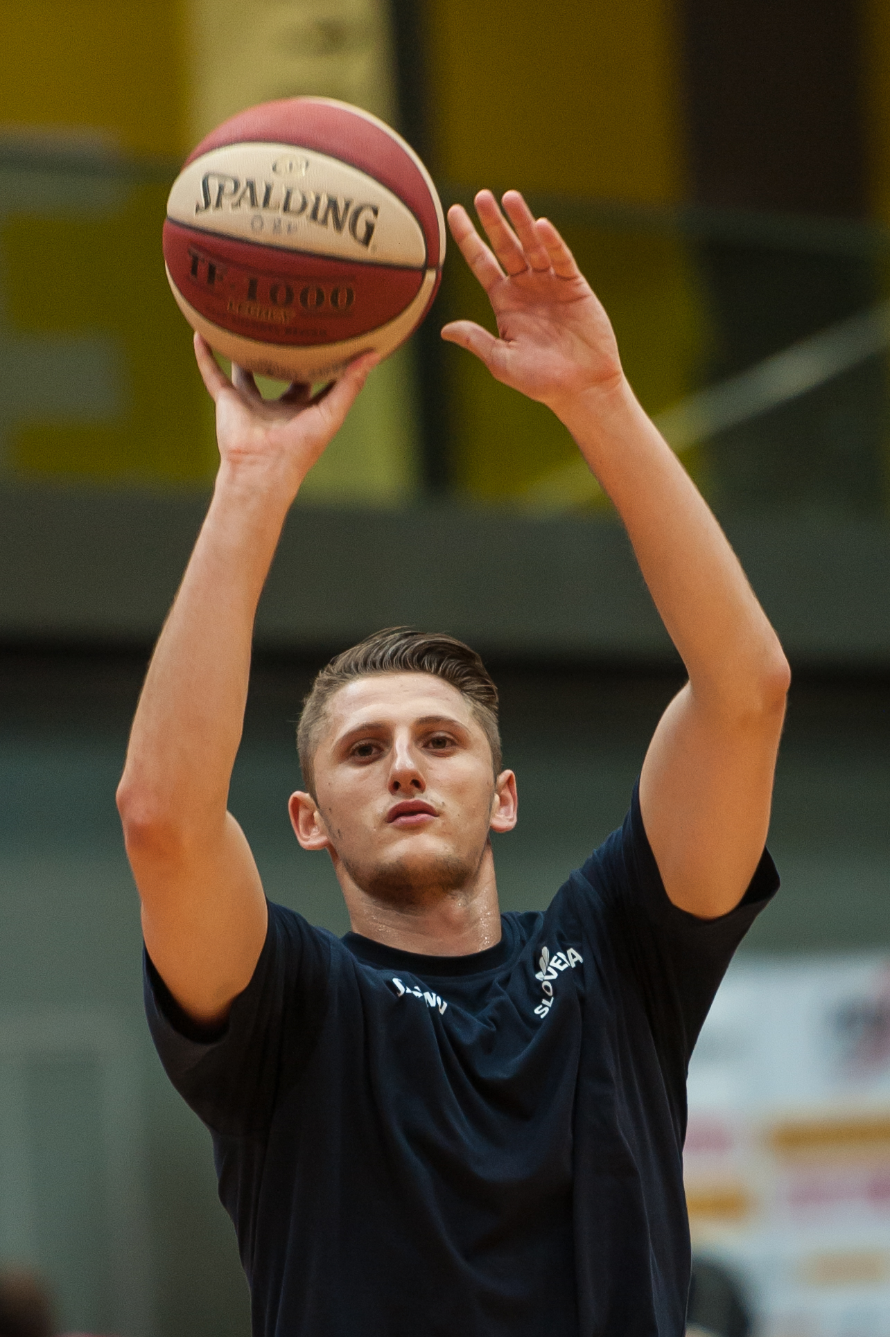 ÖBV Vier-Nationen-Turnier vom 12.-14. August 2016 in Schwechat: Österreich vs Slowenien. Bild zeigt Gezim Morina (SLO) beim Warmup.